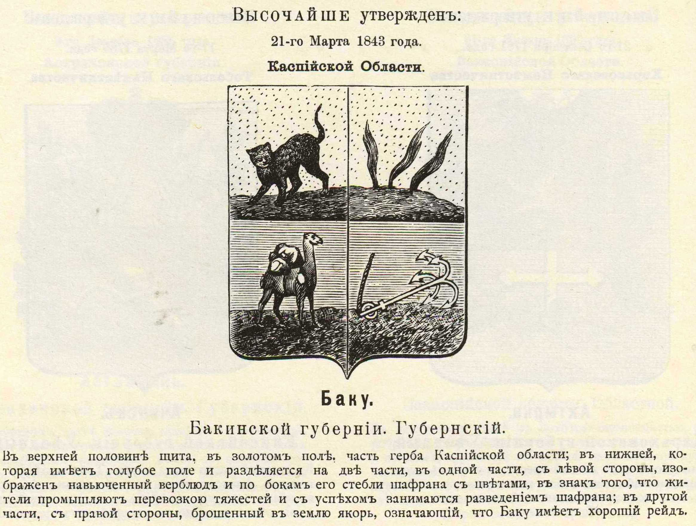 Official Russian Empire coat of arms Baku. Герб Российской Империи губернского города Баку Бакинской губернии (в 1843 - Каспийской области) с официальным описанием в Гербовнике Винклера.